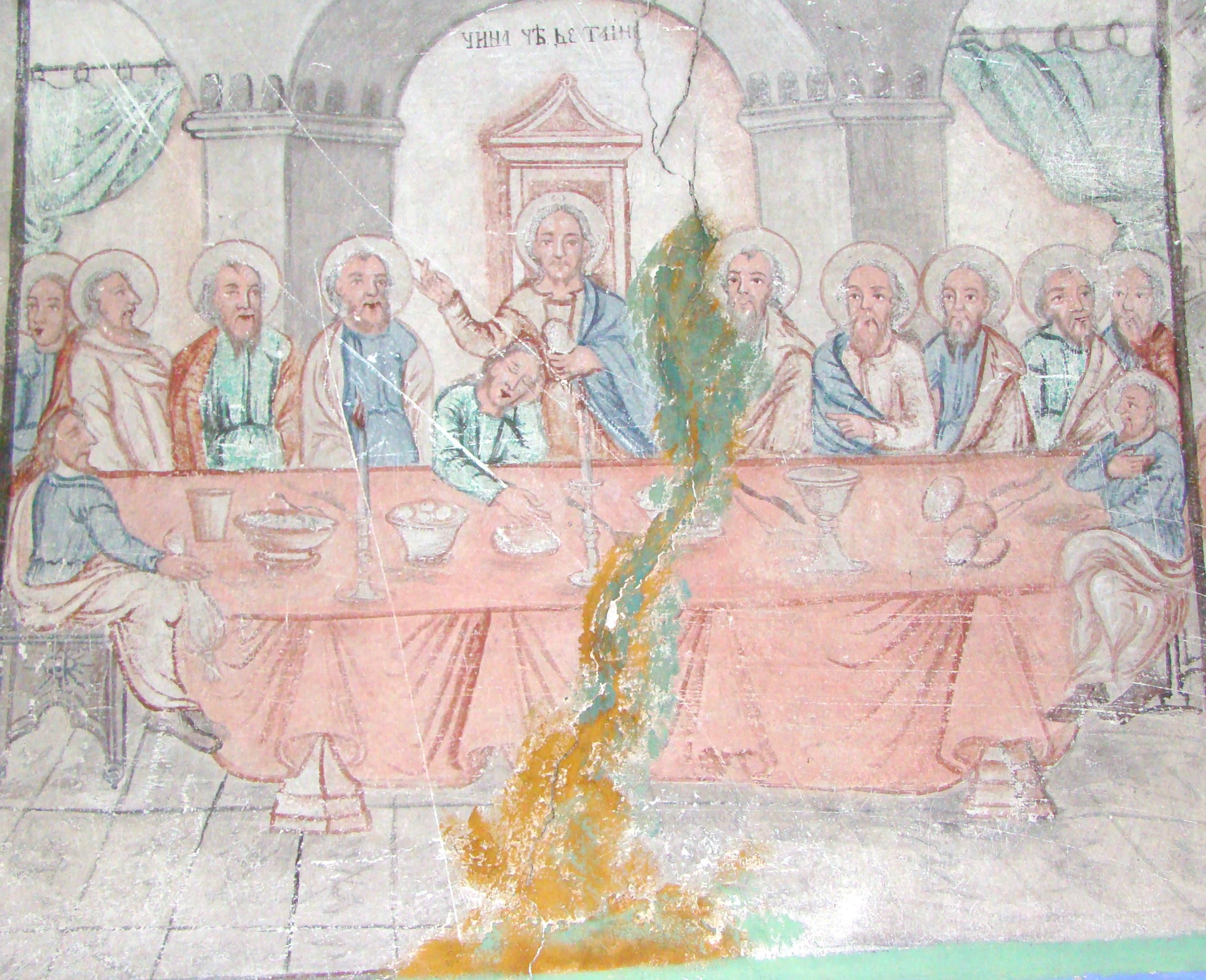 Biserica „Sf. Dumitru”, sat Poieni; comuna Vidra